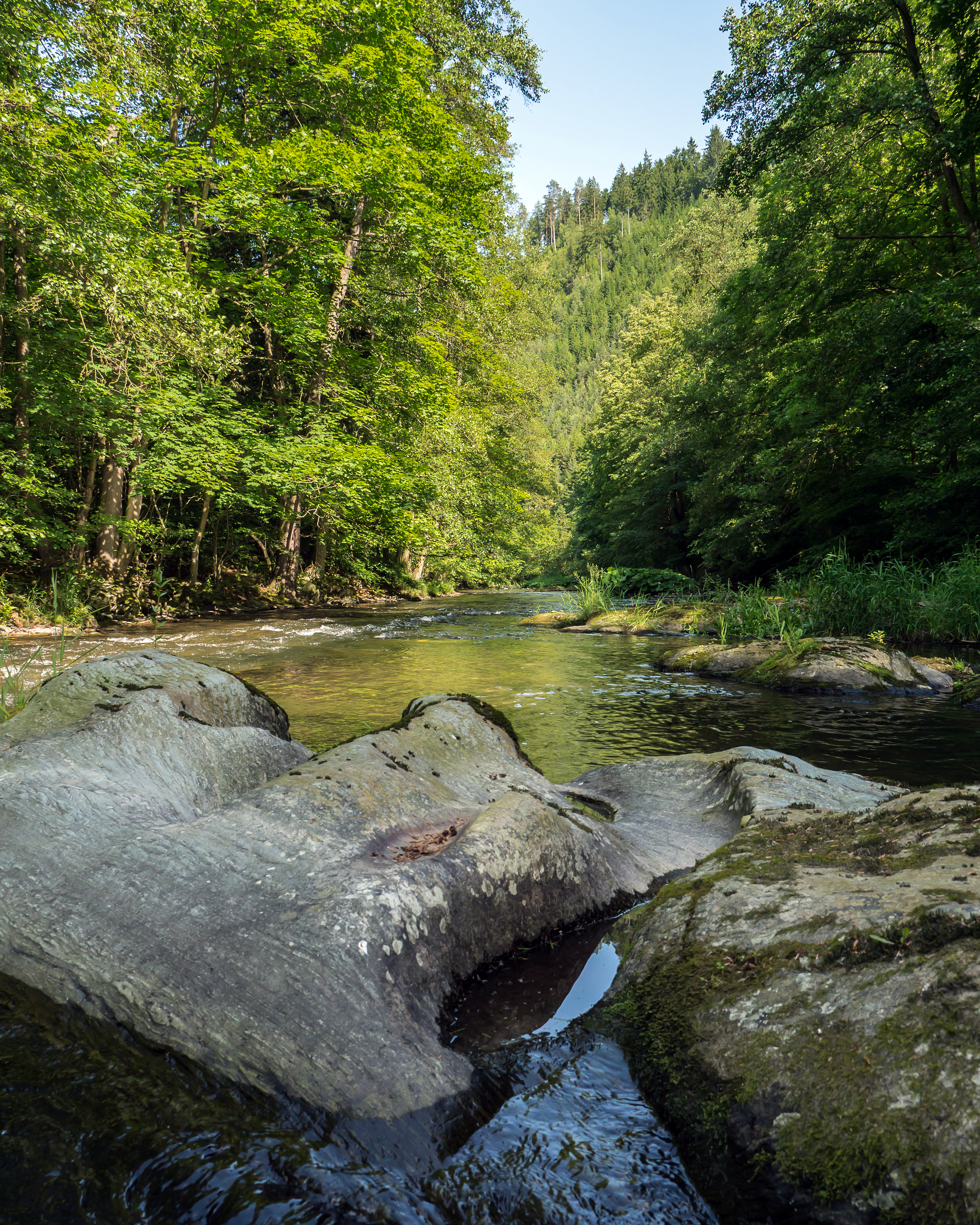 Die Schwarza zwischen Sitzendorf und Bad Blankenburg im NSG 159, Taleinschnitt mit Strudeltöpfen